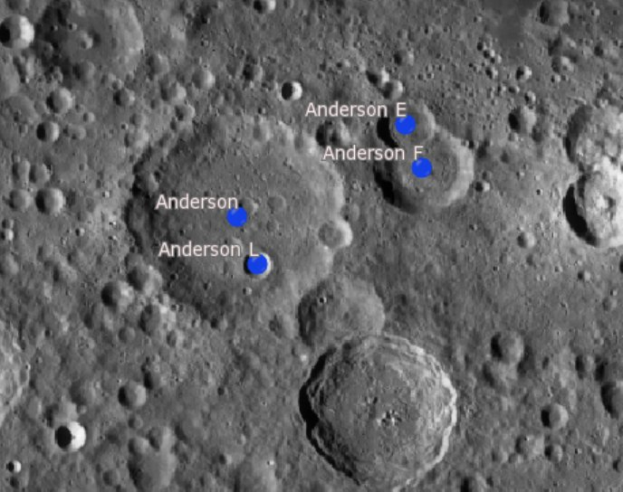 Cráter lunar Anderson. Cráteres satélite. (Imagen LRO)